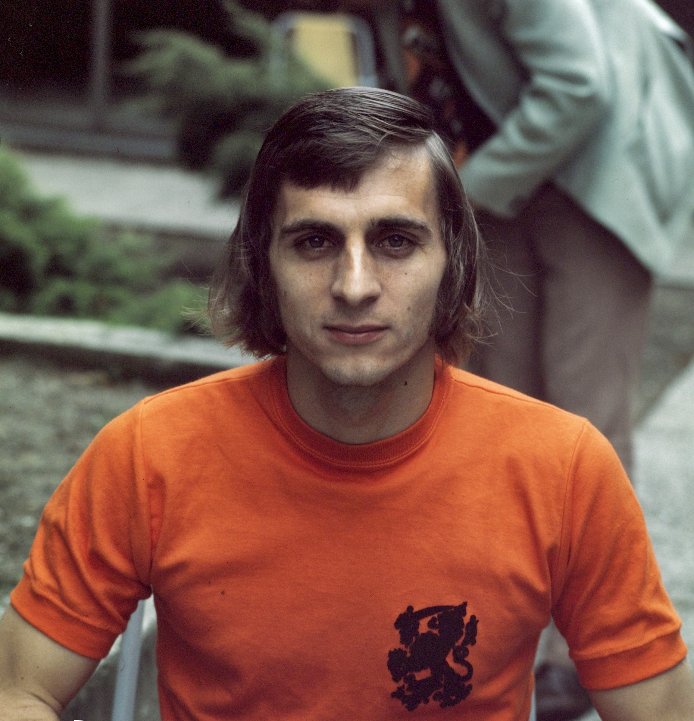 Kees van Ierssel